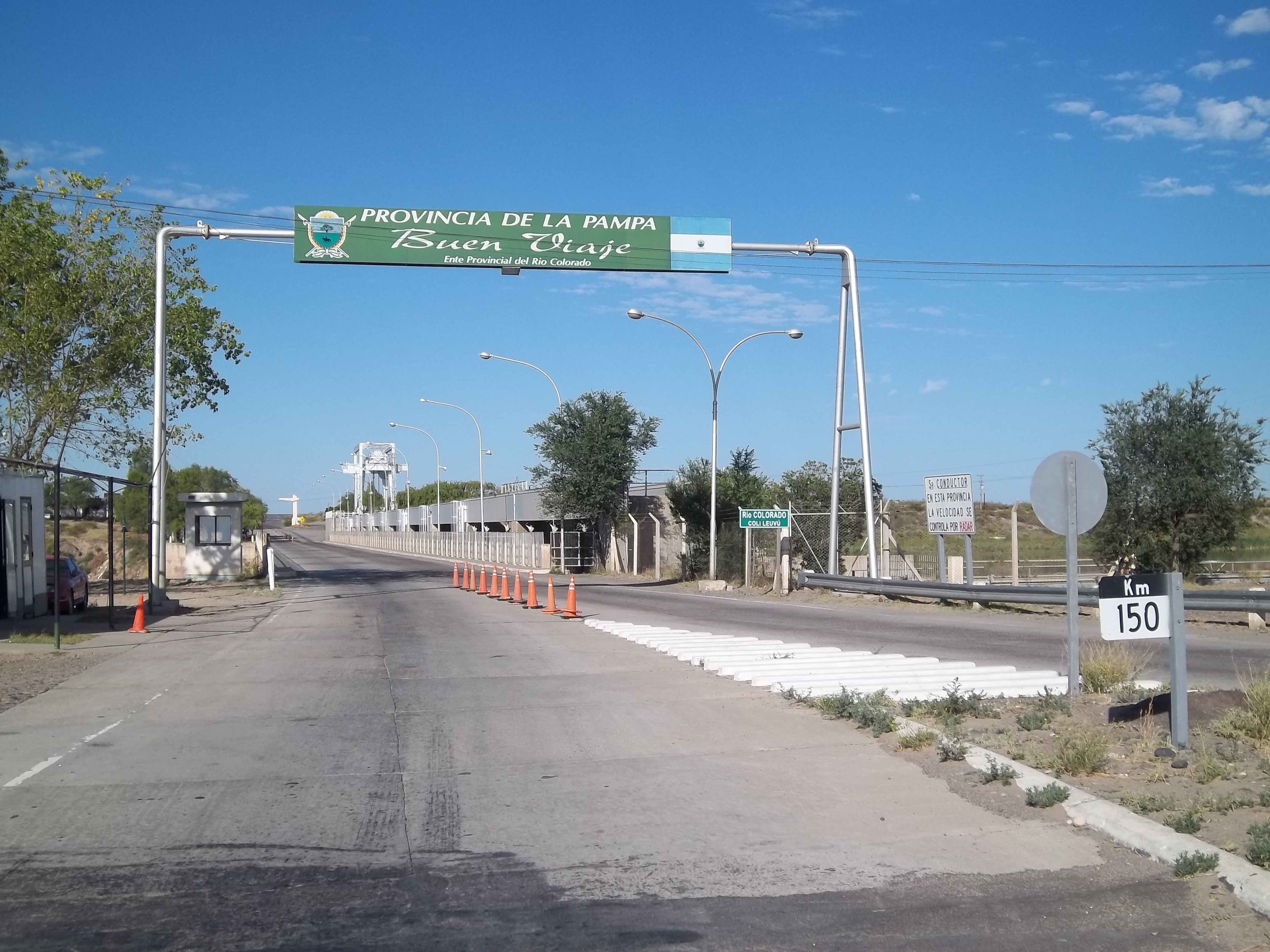 Puente Dique Punto Unido (correspondiente a la Ruta Nacional 151) sobre el Río Colorado, límite natural entre las provincias de Río Negro y La Pampa.